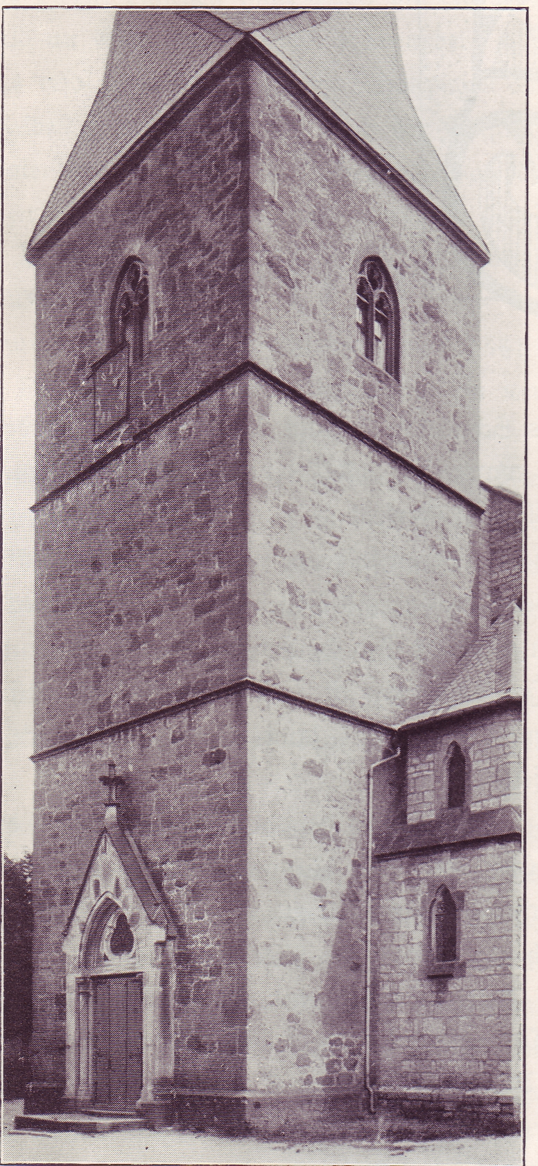 Evangelische Kirche (Gütersloh-Isselhorst) This is a photograph of an architectural monument. 068